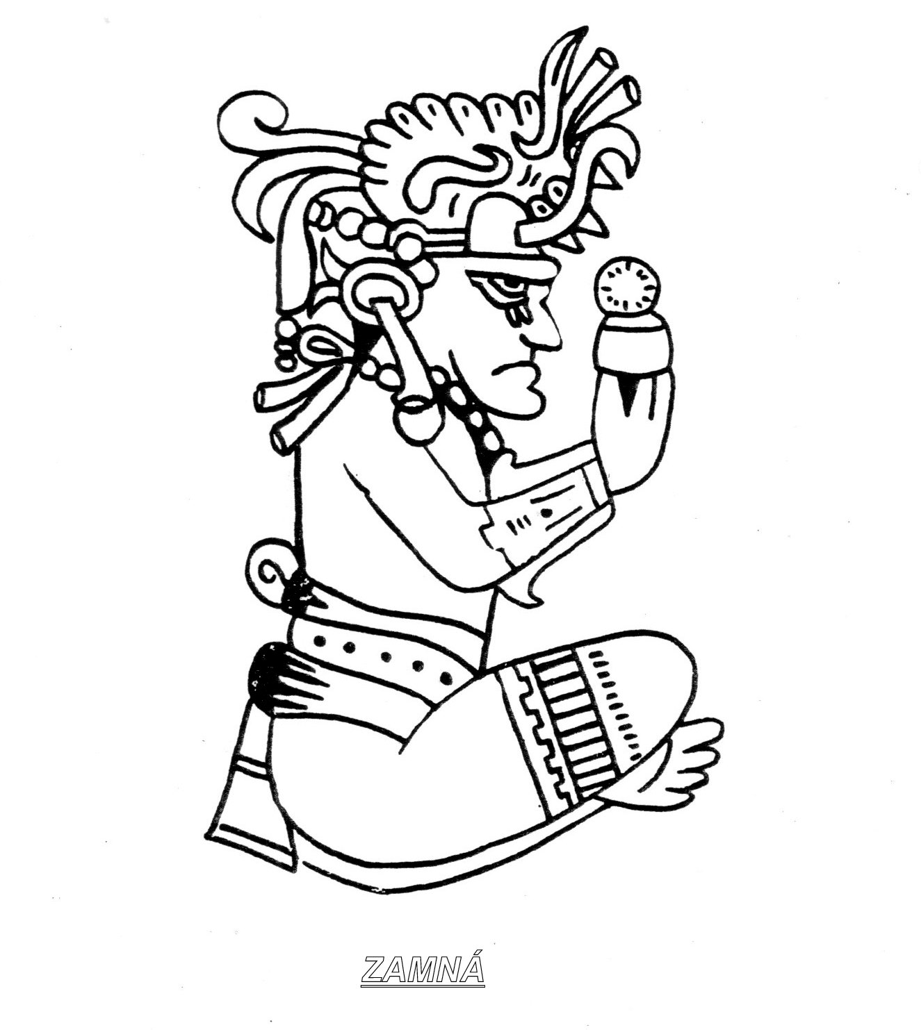 Imagen literaria de Zamná, sacerdote maya del siglo VI DC. Deificado por los Itzáes.